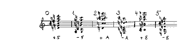 Multiplieerimine: akord 0 = multiplikatsioon puhas kvart üles (+5), akord 1 = multiplikatsioon puhas kvart alla (-5), akord 2 = multiplikatsioon väike septim üles (+A), akord 3 = multiplikatsioon väike septim alla (-A), akord 4 = multiplikatsioon väike sekst üles (+A), akord 5 = multiplikatsioon väike sekst alla (-A). Multiplieerimist võib kasutada faktuuri tiheduse paindlikul muutmisel